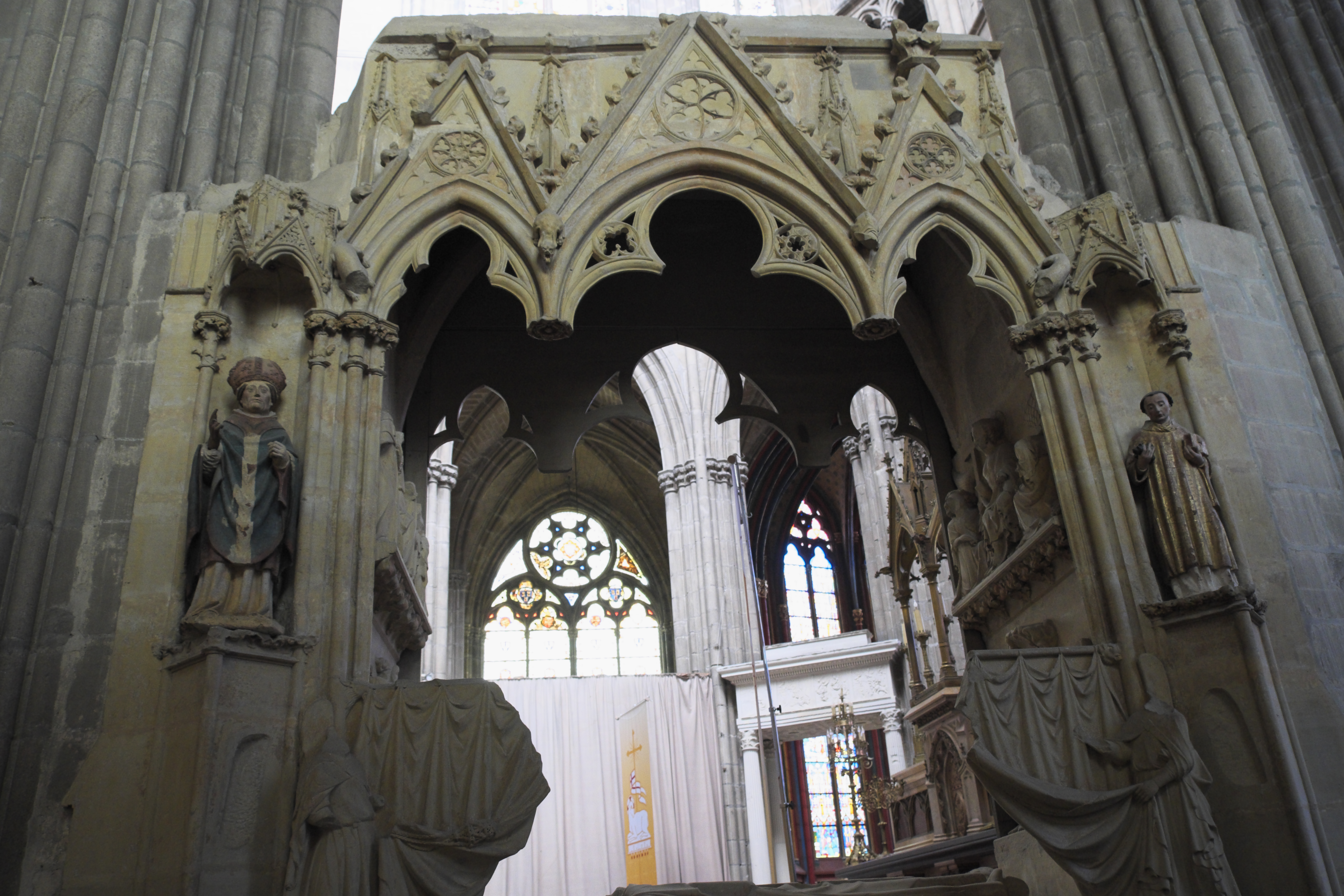 Kathedrale Saint-Étienne in Limoges im Département Haute-Vienne (Nouvelle-Aquitaine/Frankreich), Grabmal des Bischofs Raynaud de la Porte